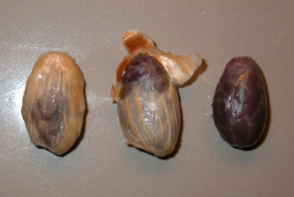 Cocoa seeds with and without mucilage cover Graines de cacao avec et sans couverture de mucilage